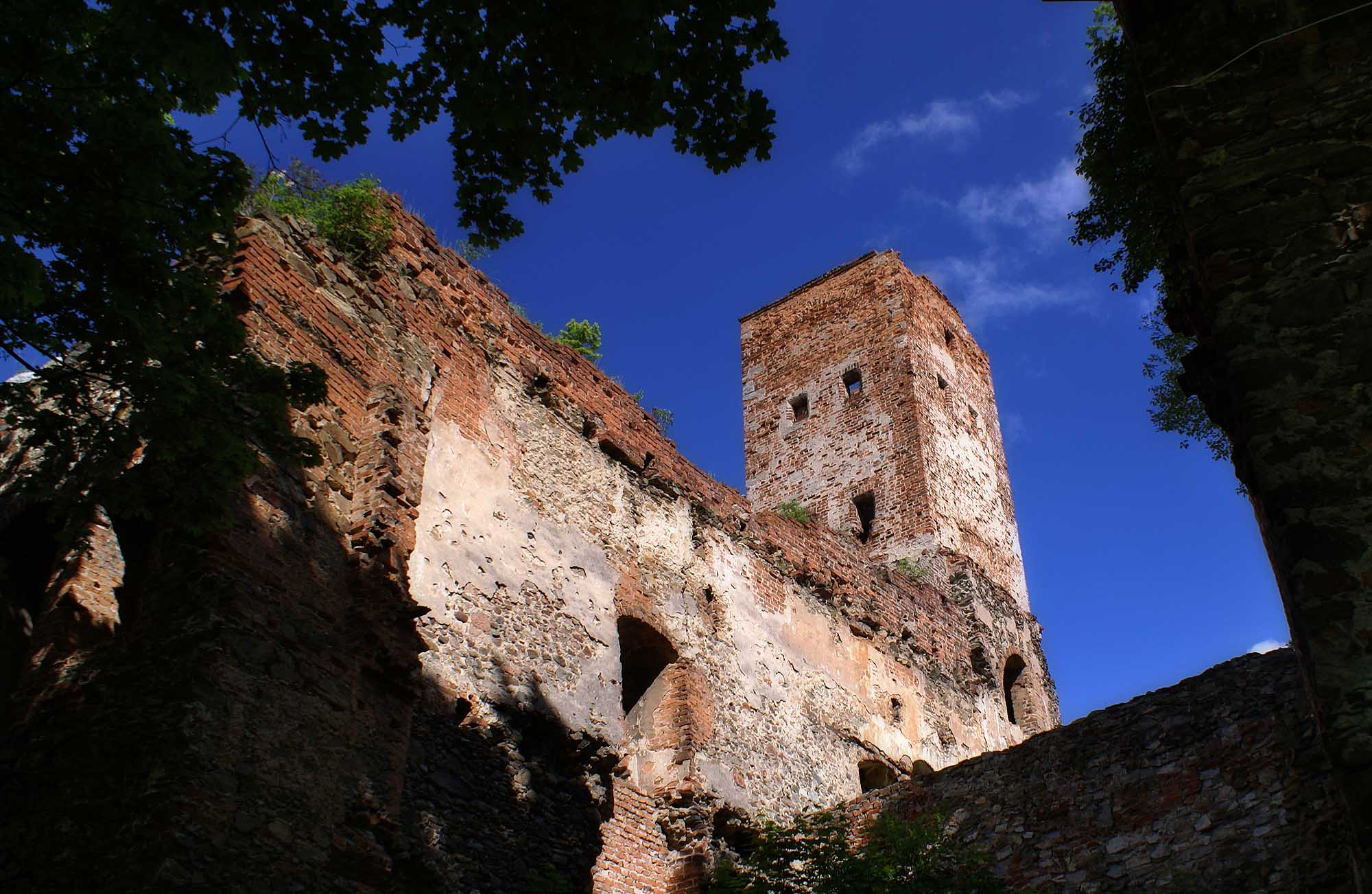 Ząbkowice Śląskie - zamek z dziedzińcem oraz przyległym otoczeniem tj. placem graniczącym z zabudową miejską, wałami i skarpą ziemną